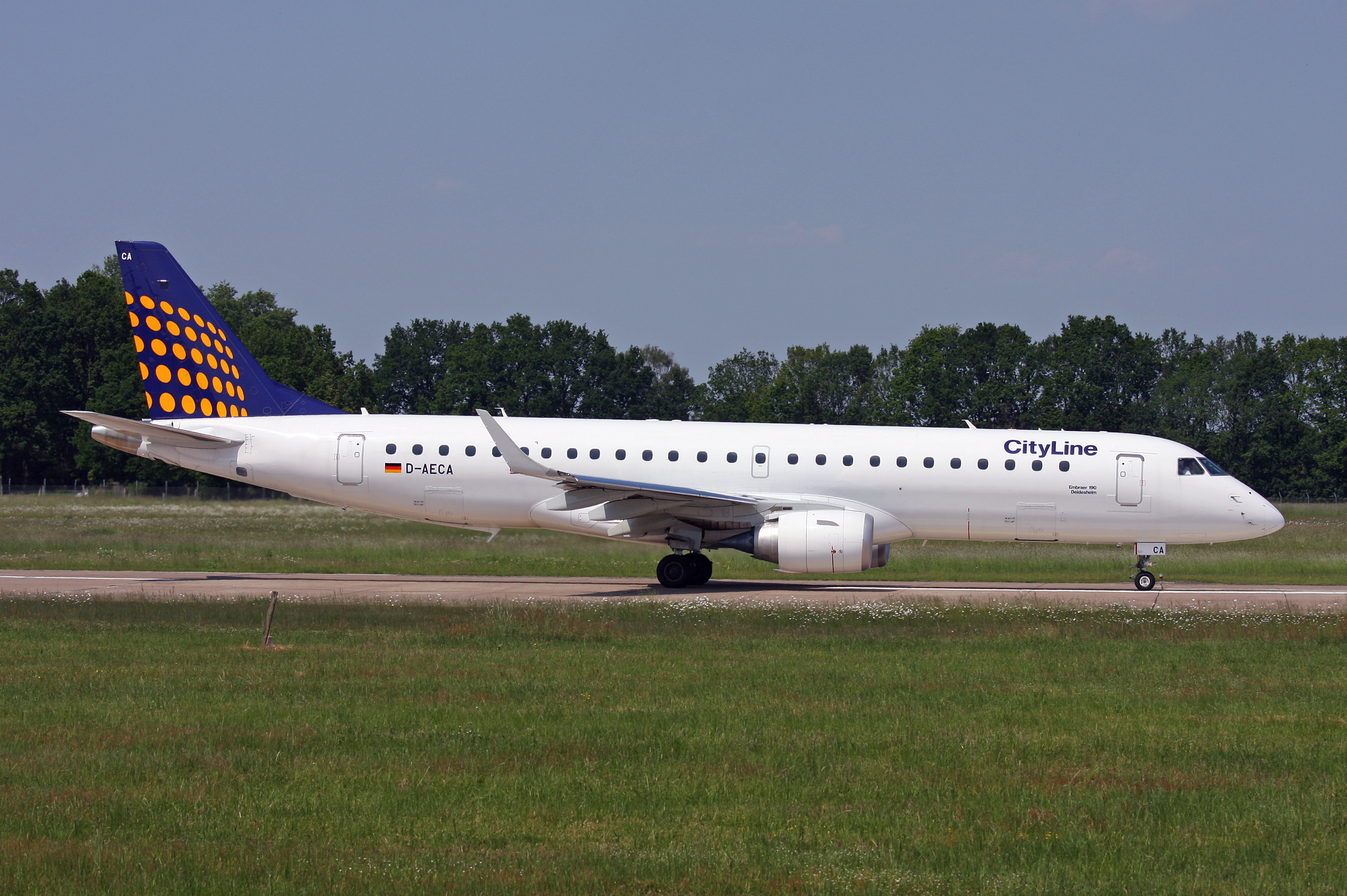 Haj / Eddv 06-06-10